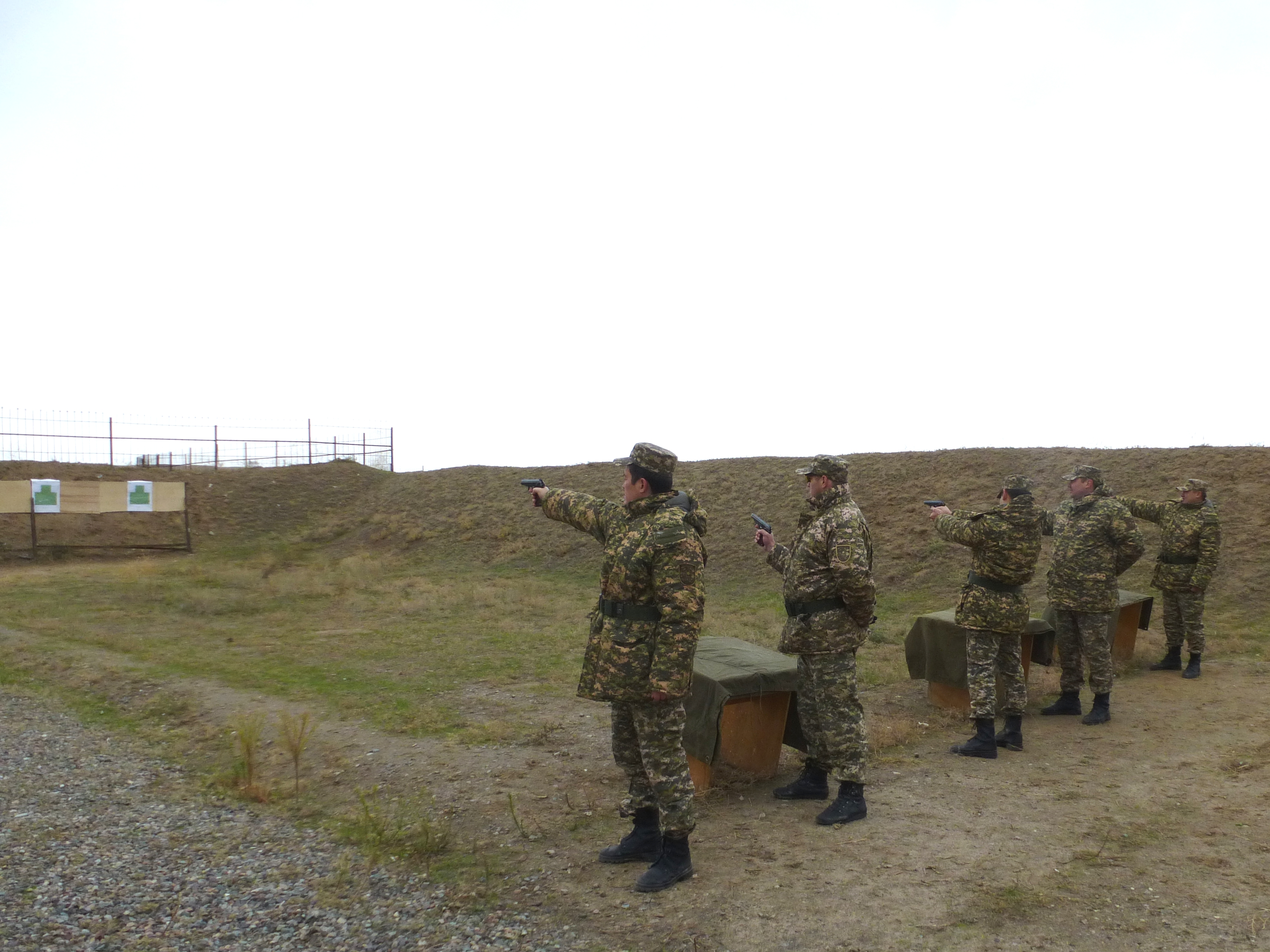 Огневая подготовка офицеров запаса. Казахстан, 2014 год. Полигон Алматинского Института Сухопутных Войск